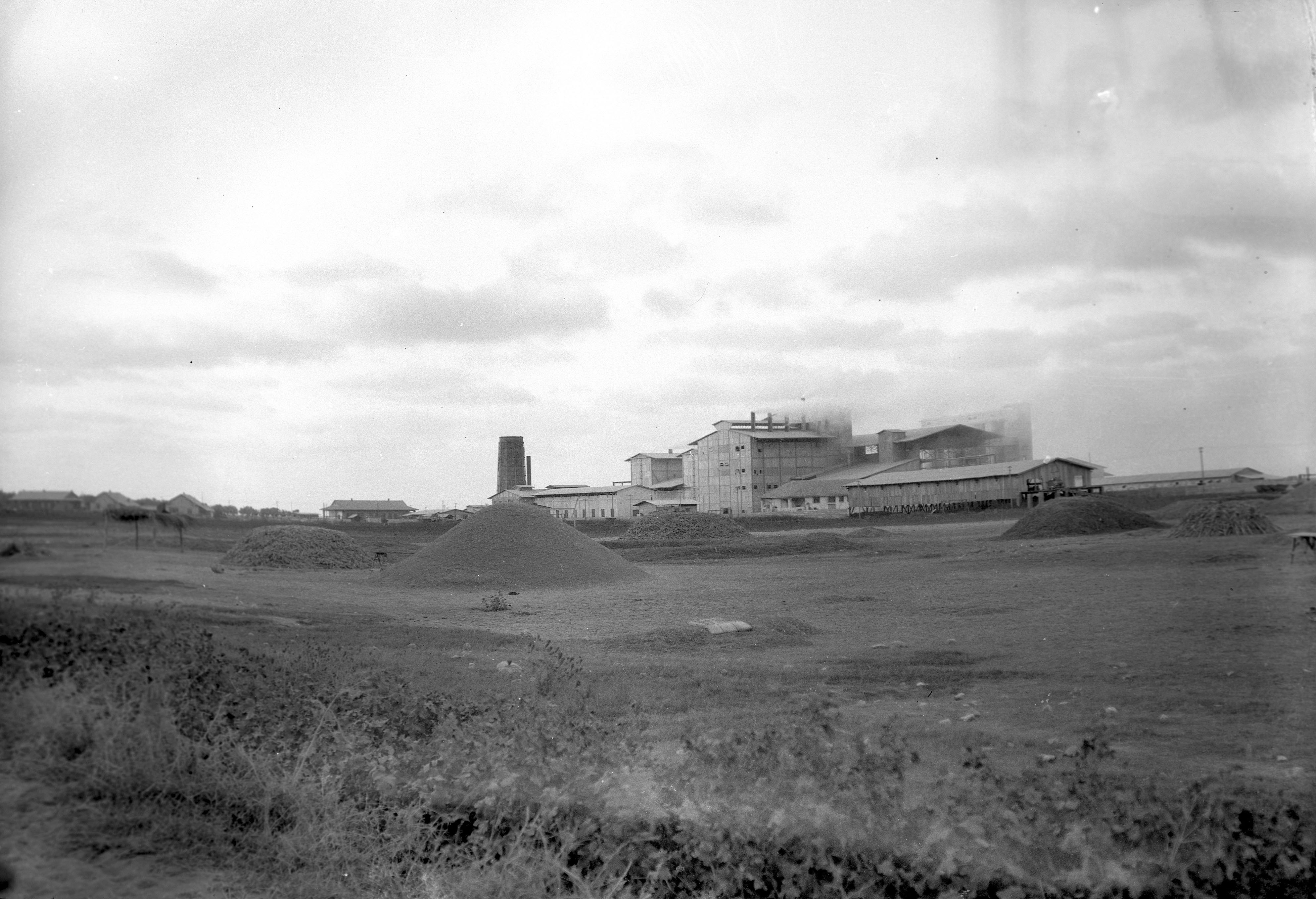 בית חרושת נשר היישוב נשר בימיו הראשונים